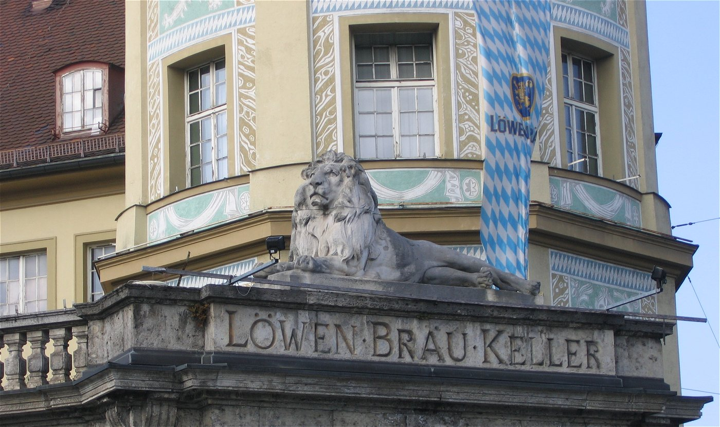 Löwe auf der Terrasse des Löwenbräukellers, München (Wilhelm von Rümann, um 1900)